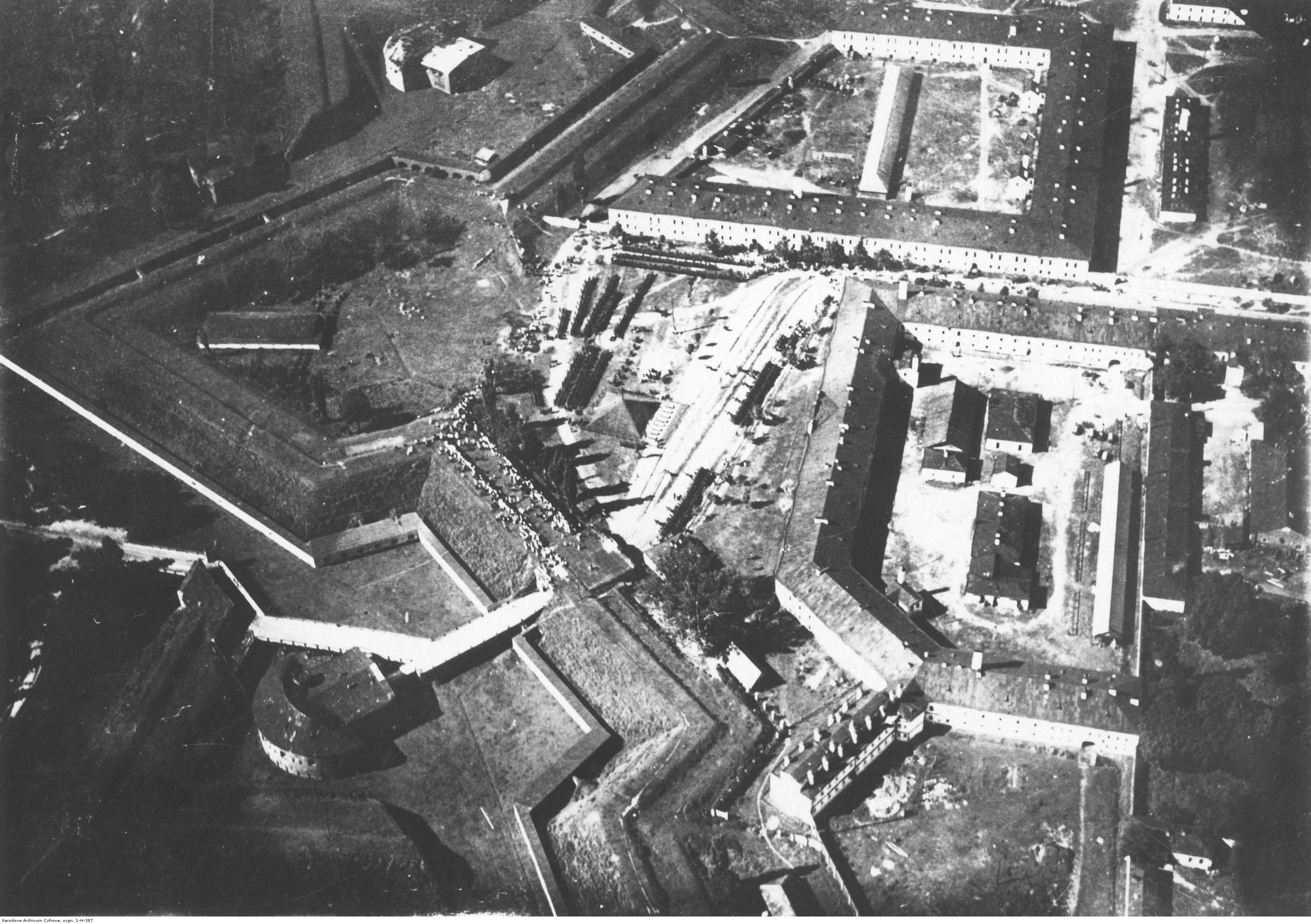 Wojna polsko-sowiecka. Twierdza w Bobrujsku: fotografia z lotu ptaka. Koncern Ilustrowany Kurier Codzienny - Archiwum Ilustracji. Sygnatura: 1-H-387